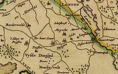 fragment van Nieuwe kaart van het vrye landschap Drenthe